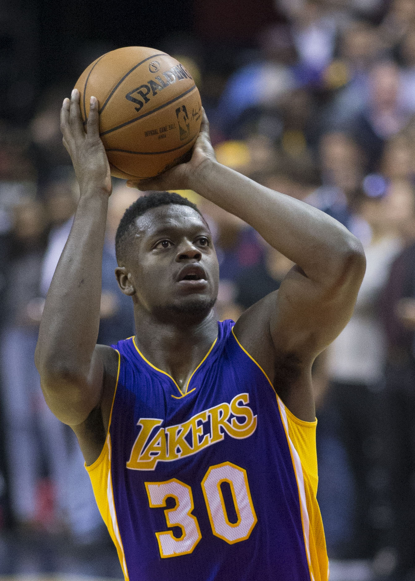 Julius Randle of Los Angeles Lakers